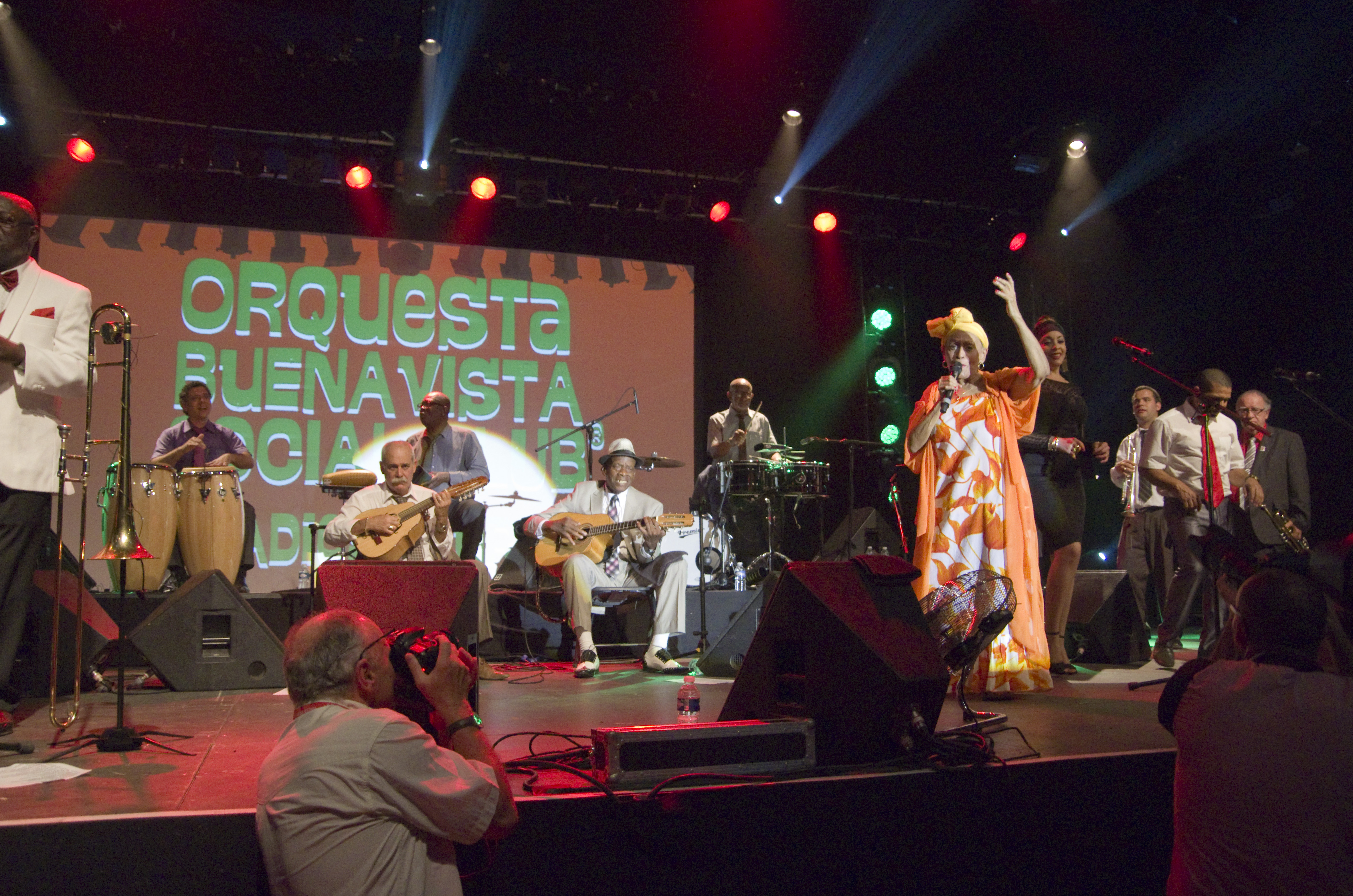 Das Zelt-Musik-Festival 2015 in Freiburg im Breisgau. 06.07.2015 Orquesta Buena Vista Social Club